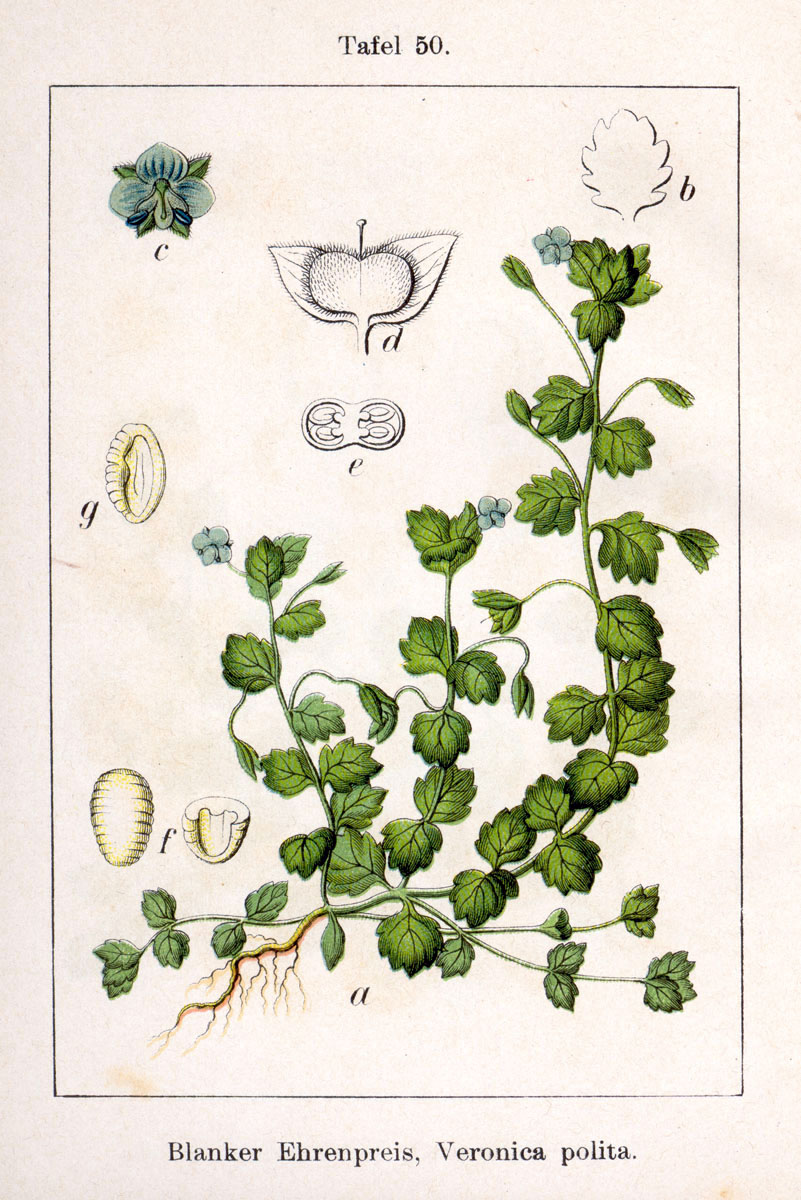 Veronica polita Fr. Original Description Blanker Ehrenpreis, Veronica polita